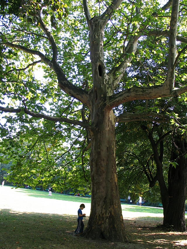 Platan klonolistny - korona wyprowadzona na wysokim pniu uzyskanym przez okrzesanie młodych roślin